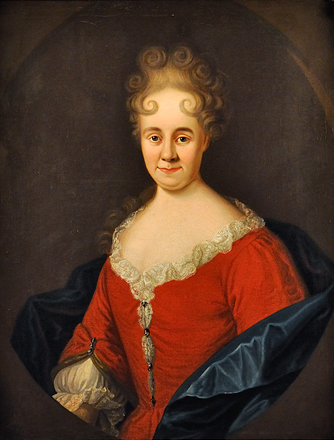 Bildnis der Anna Margarethe Senckenberg geb. Raumburger (1682-1740), Mutter von Johann Christian Senckenberg und Heinrich Christian von Senckenberg. Ehefrau von Johann Hartmann Senckenberg